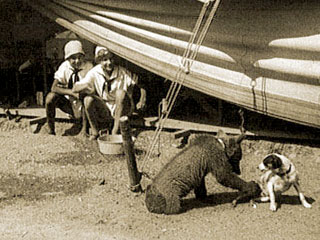 Кадр из фильма «Трое»